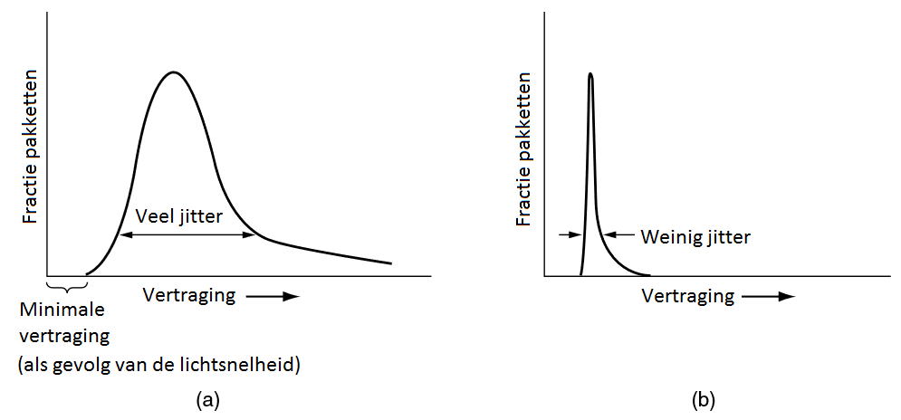 Het verband tussen een verzending met veel- en weinig jitter